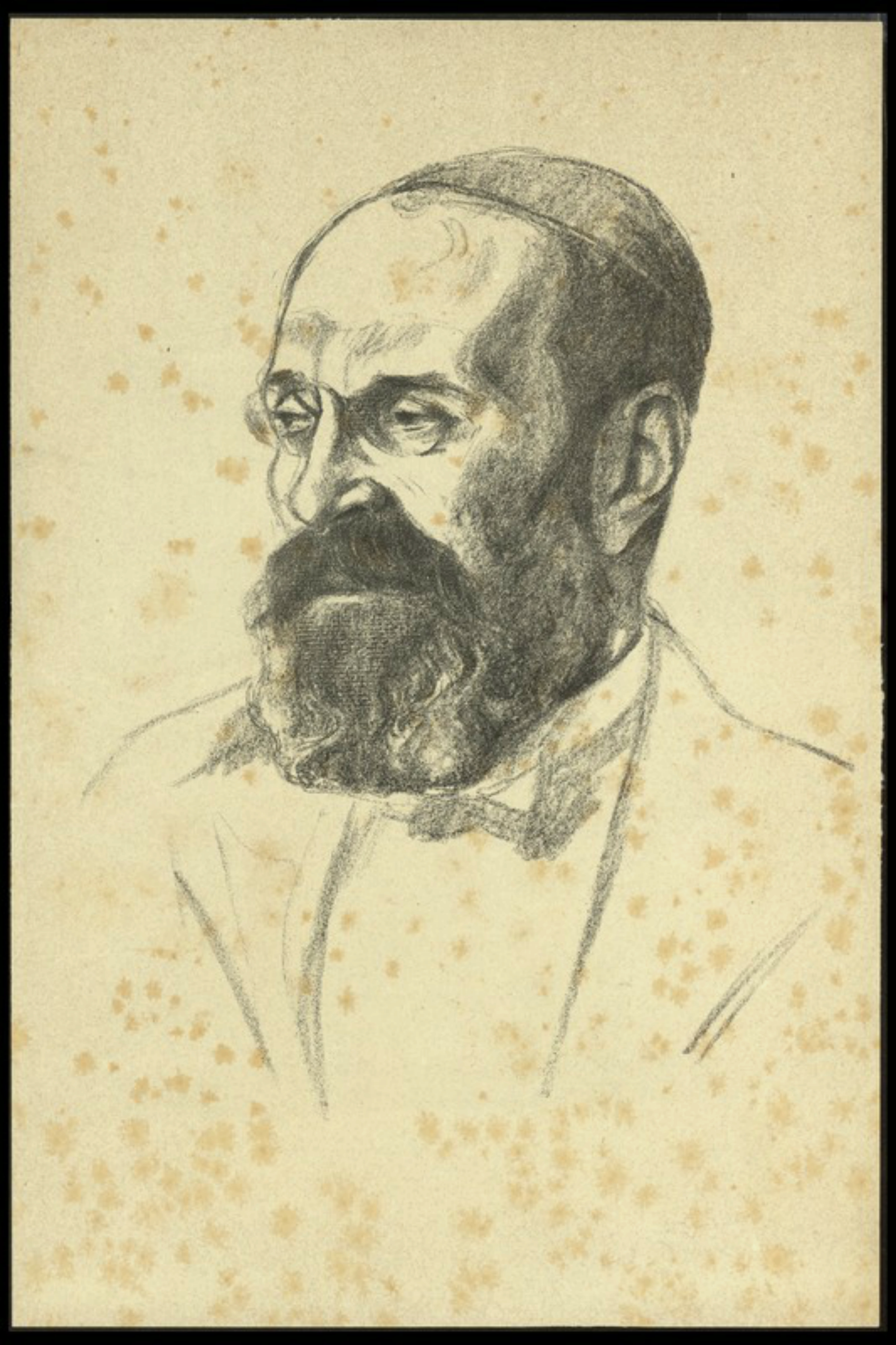 הדפס של רישום דיוקן הרב חיים בראדי בפחם, מאת האמן הרמן שטרוק: ליתוגרפיה על נייר, שחור לבן, 23X35 ס"מ, ללא חתימה או ציון שנת ההפקה.